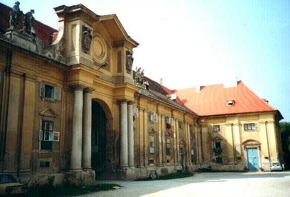 Lednice-Stallungen